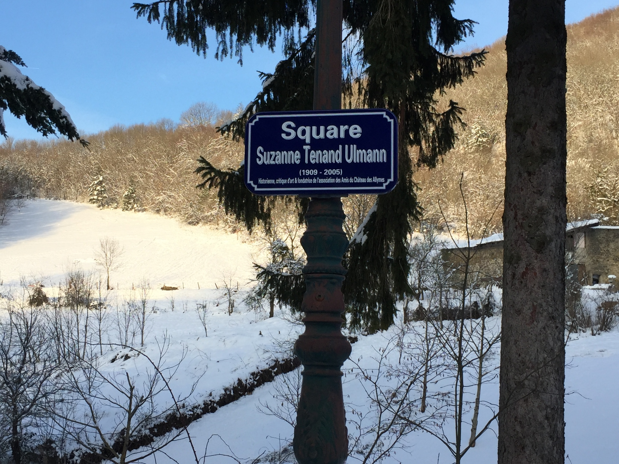 Les Allymes, l'écart de Brey de Vent et le château des Allymes. This photograph was taken with an iPhone 6